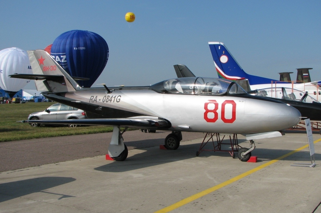 Majitel: konstrukční skupina "Současné letecké technologie"